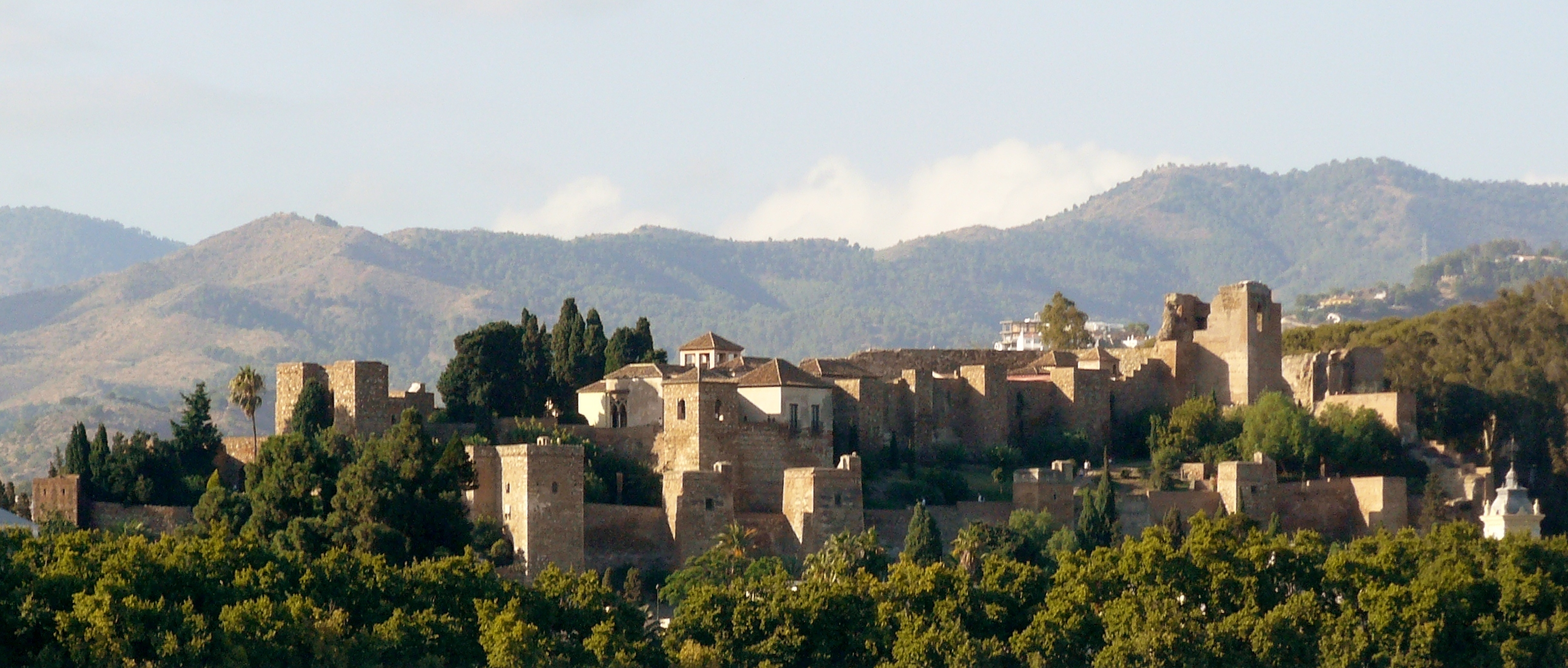 Málaga.